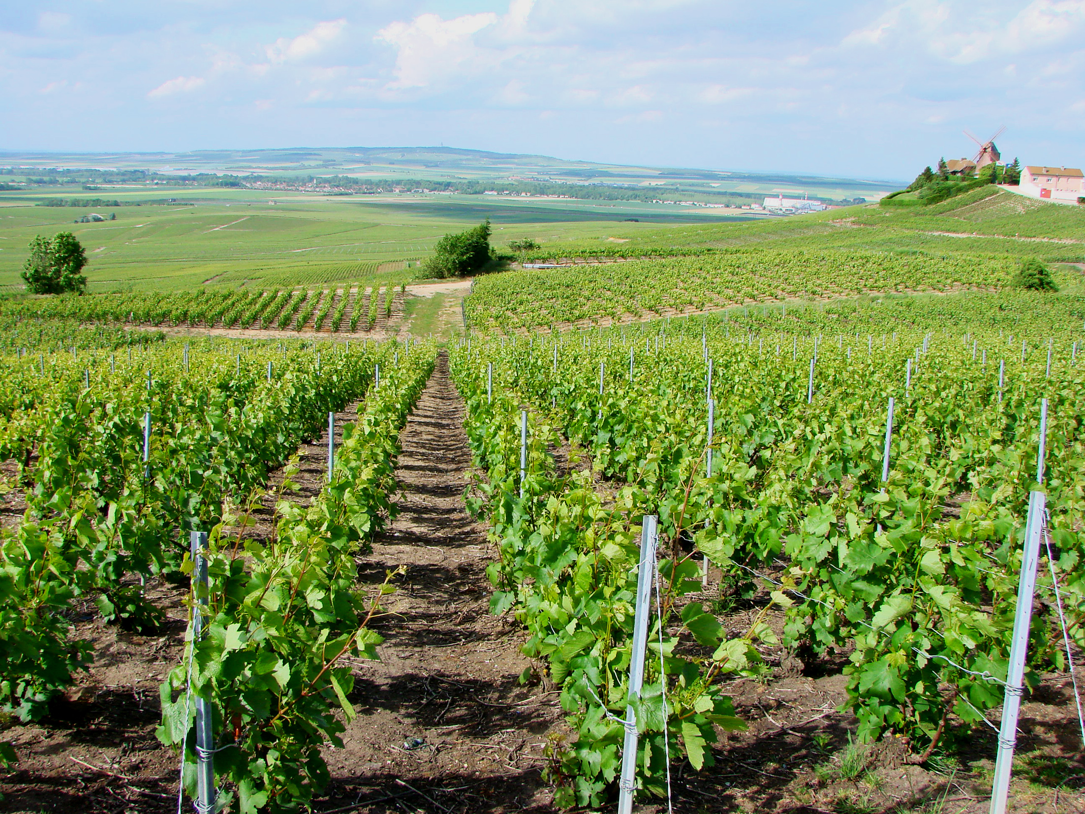 Vignoble du champagne sur la Montagne de Reims: Verzenay.(Mai 2007)